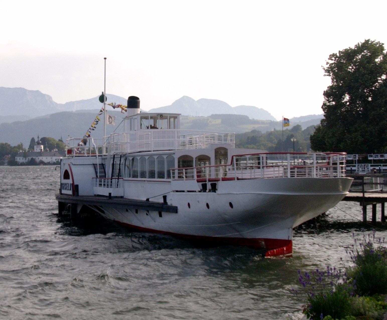 Dampfschiff Gisela